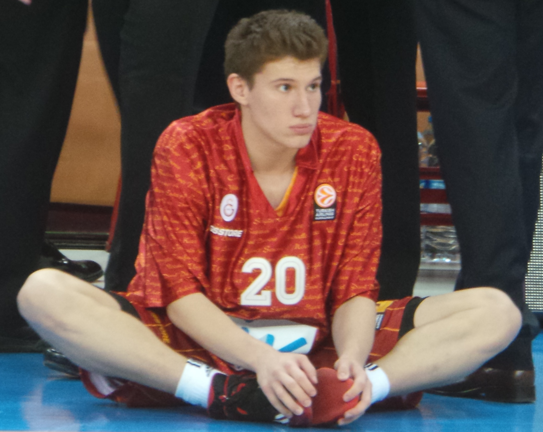 Kristijan Nikolov- Zvezda